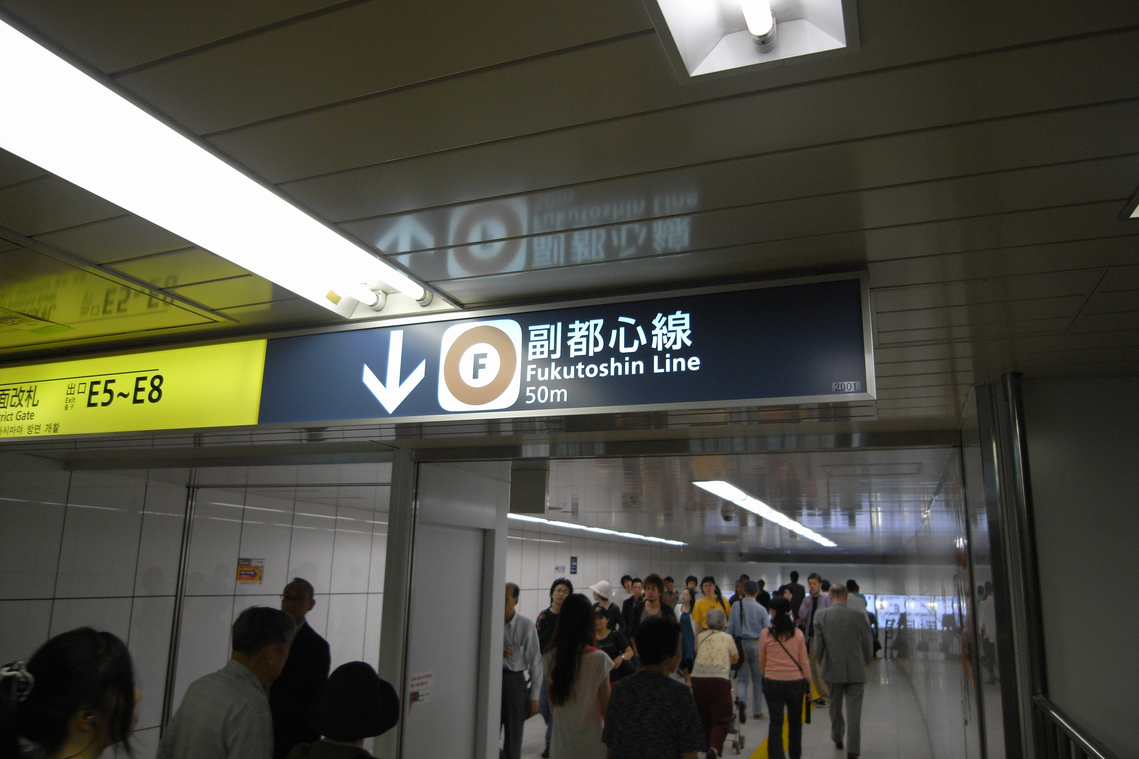 Tokyo Metro Fukutoshin Line sign at Shinjuku-sanchome station